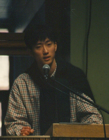 Fre 1997 til 1998 var Casper Roed Pedersen fra Aalborg landsformand for Folkeskoleelevernes Landsorganisation (FLO). Billede fra 1997.